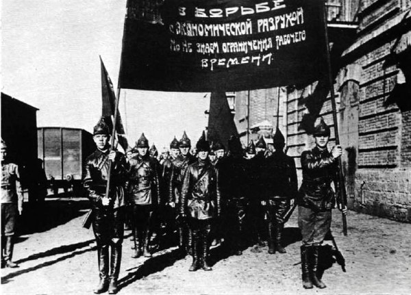 Leon Trotsky's Armored Train